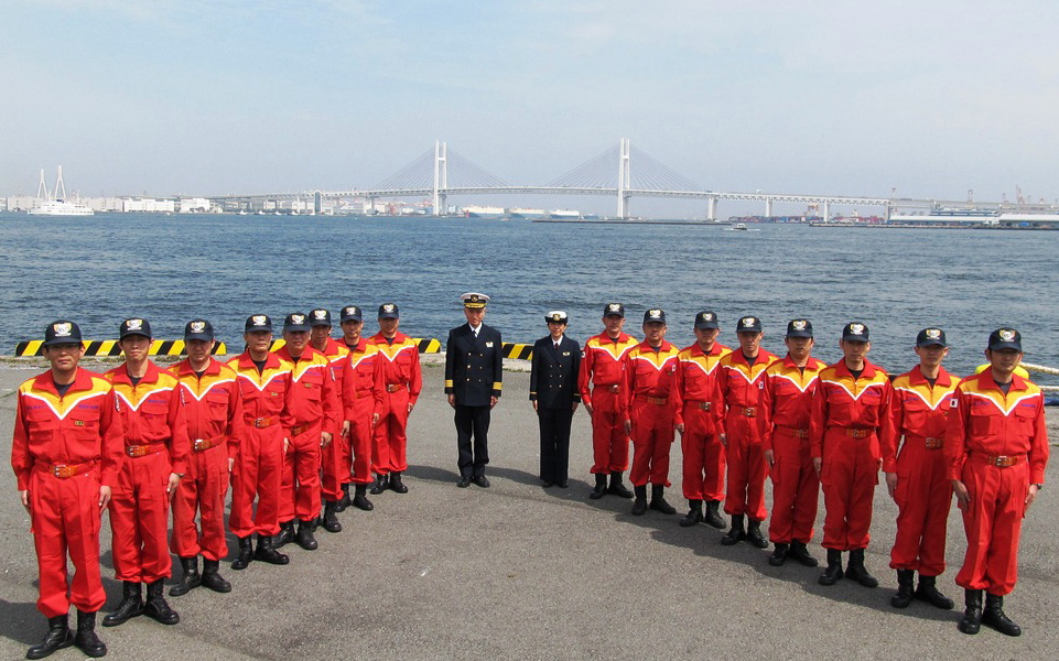 横浜機動防除基地において勢揃いした隊員。